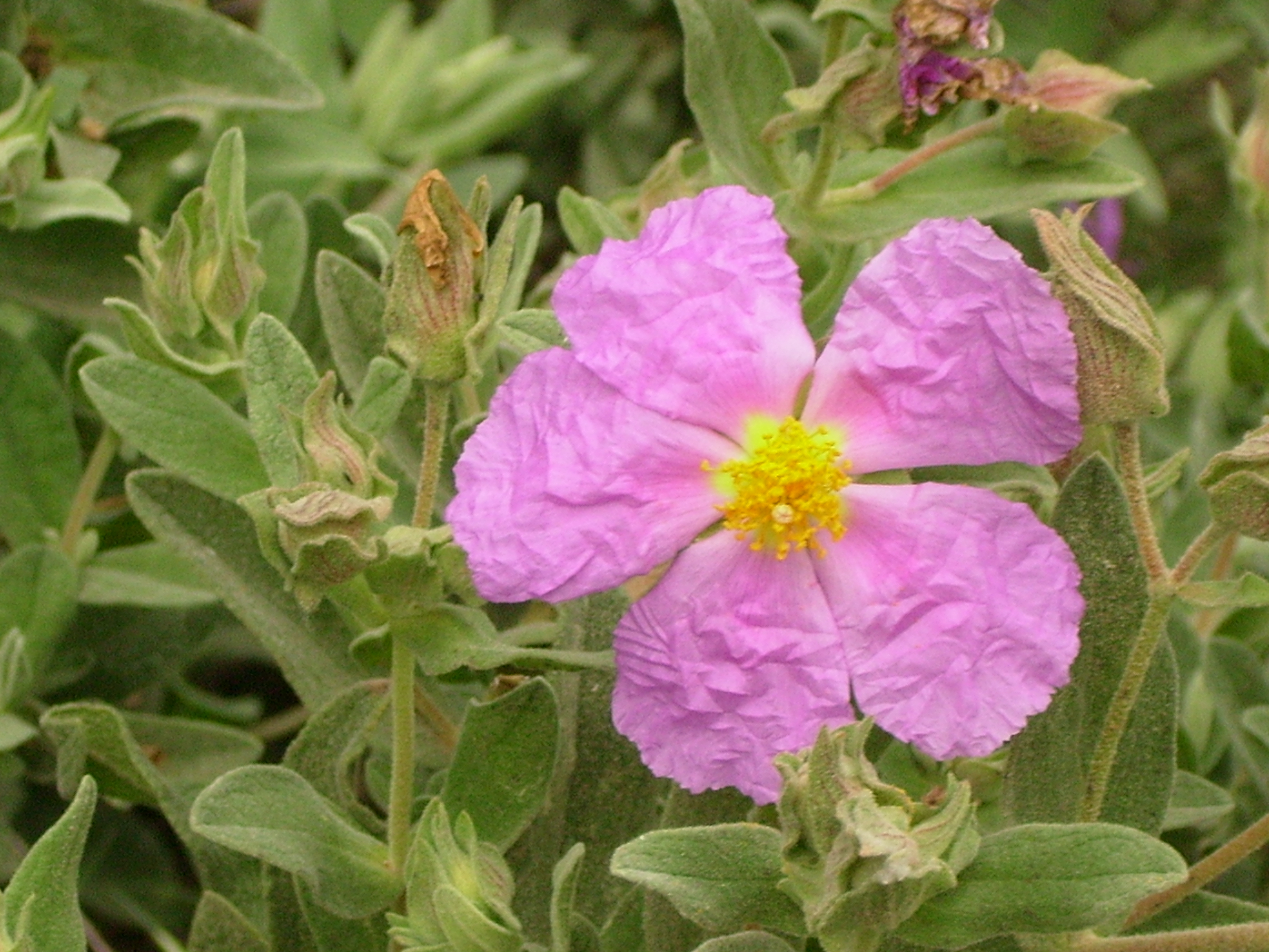 Flors boscanes. Bordiol rosa o estepa blanca